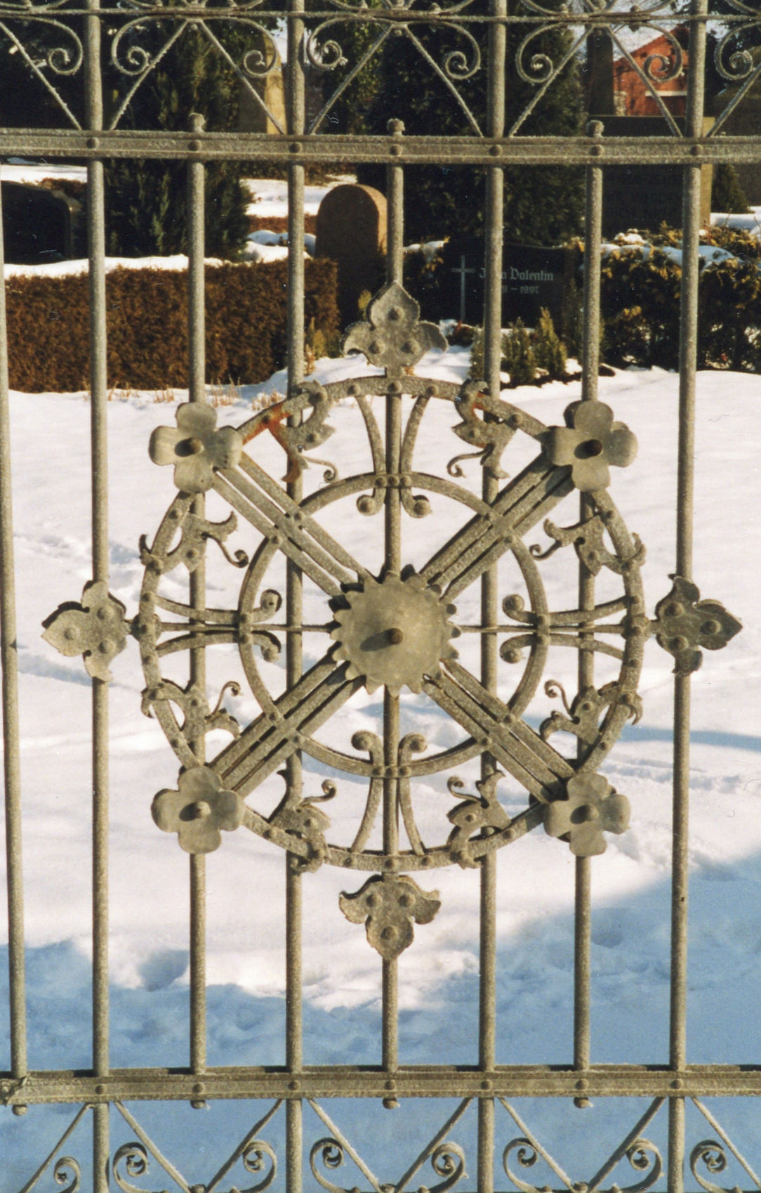 Klosterfriedhof Dobbertin, Mecklenburg-Vorpommern. Verzierung am Eingangstor.